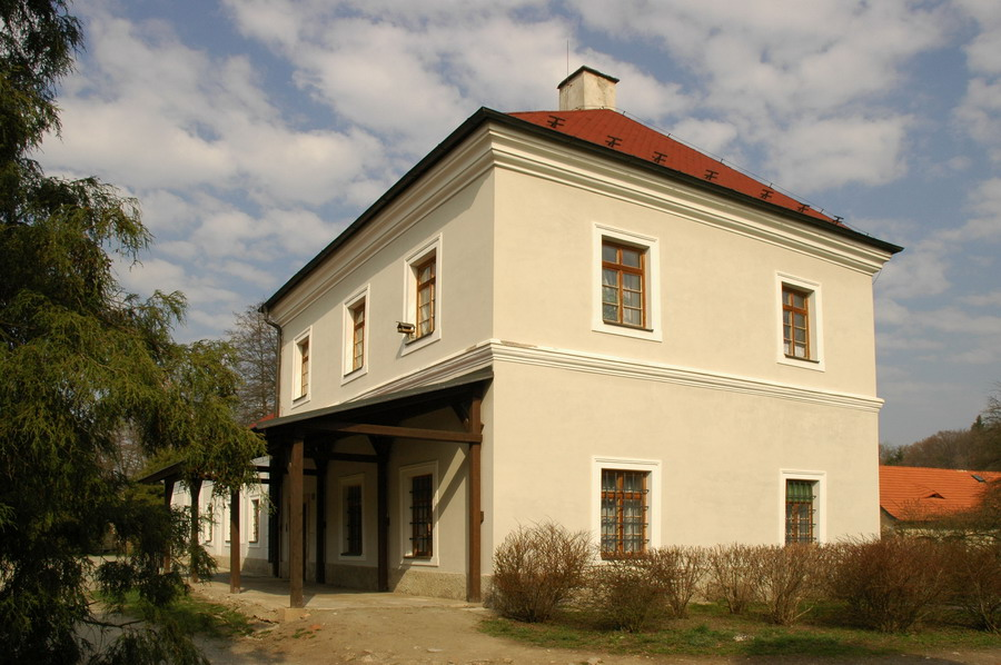 Ratibořice; mandl